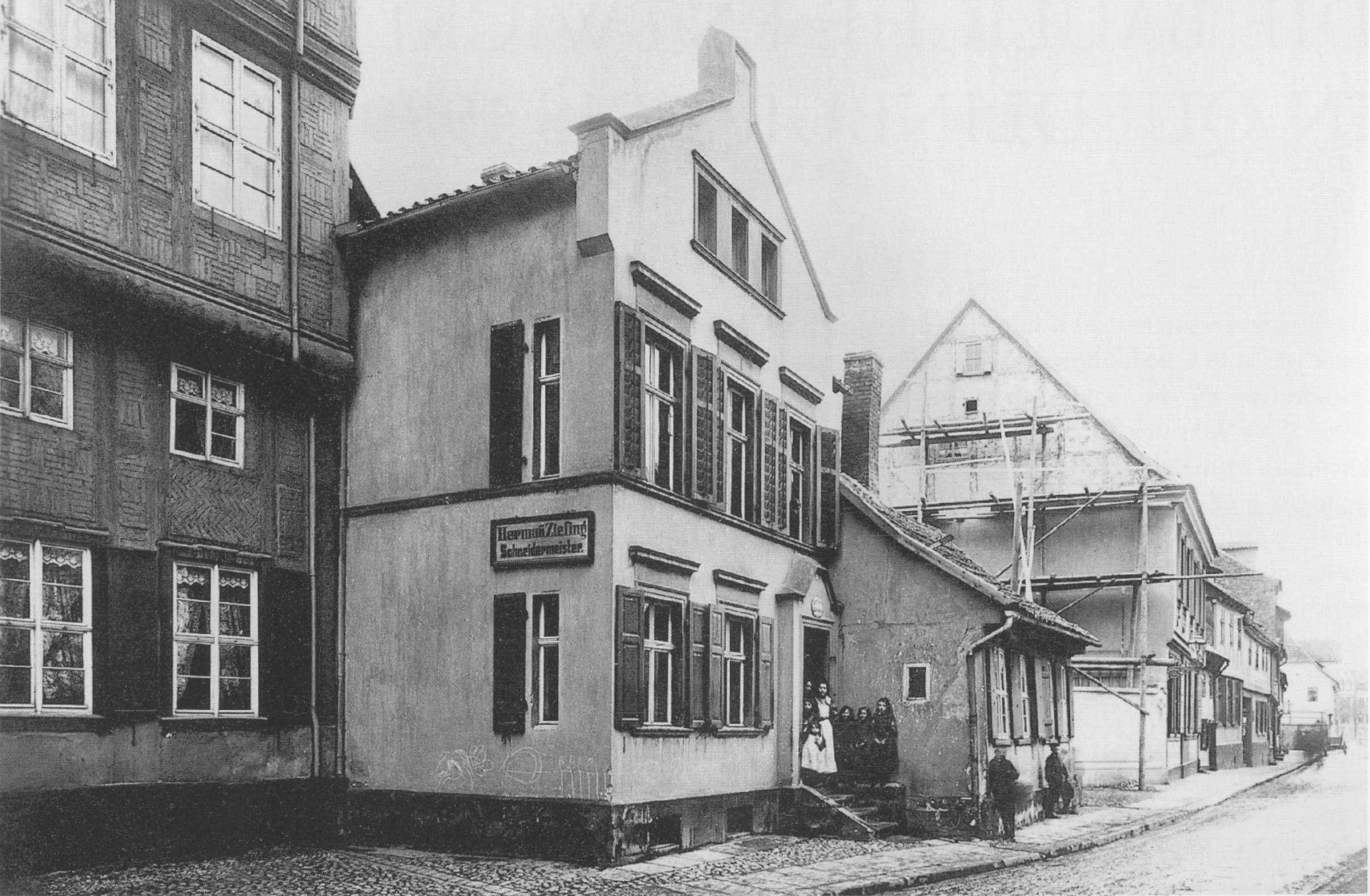 Schmale Straße 33 (links im Bild), vor dem Durchbruch der Donndorfstraße, Quedlinburg 1906